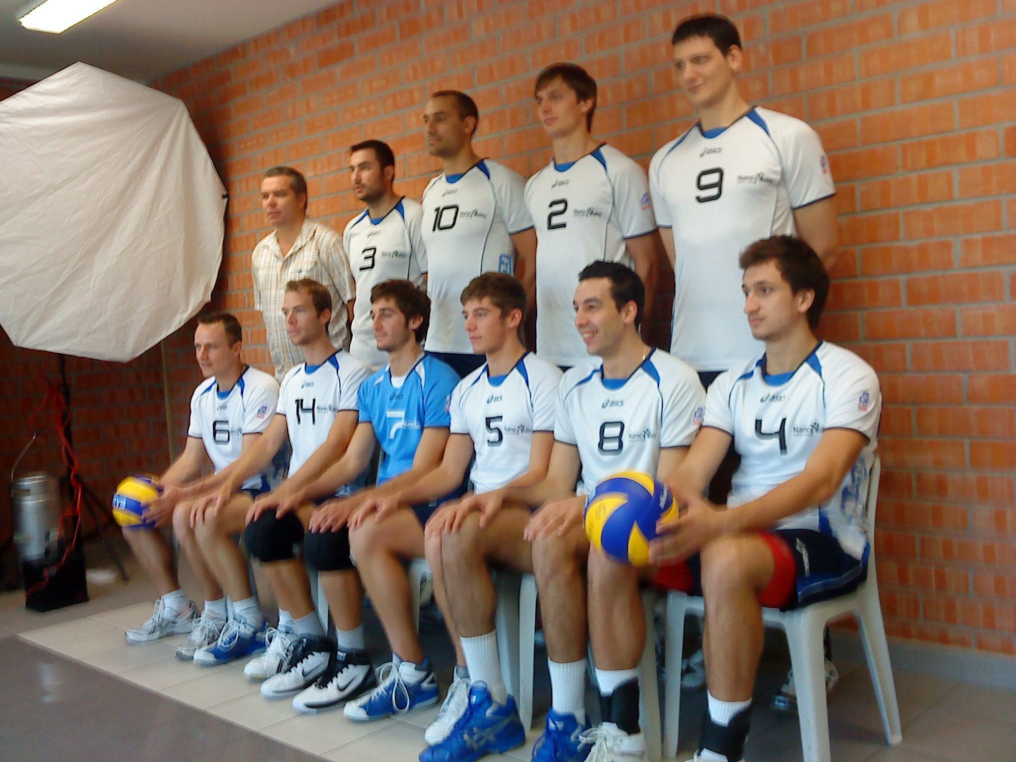 L'équipe de Nancy volley pour la saison 2010-2011